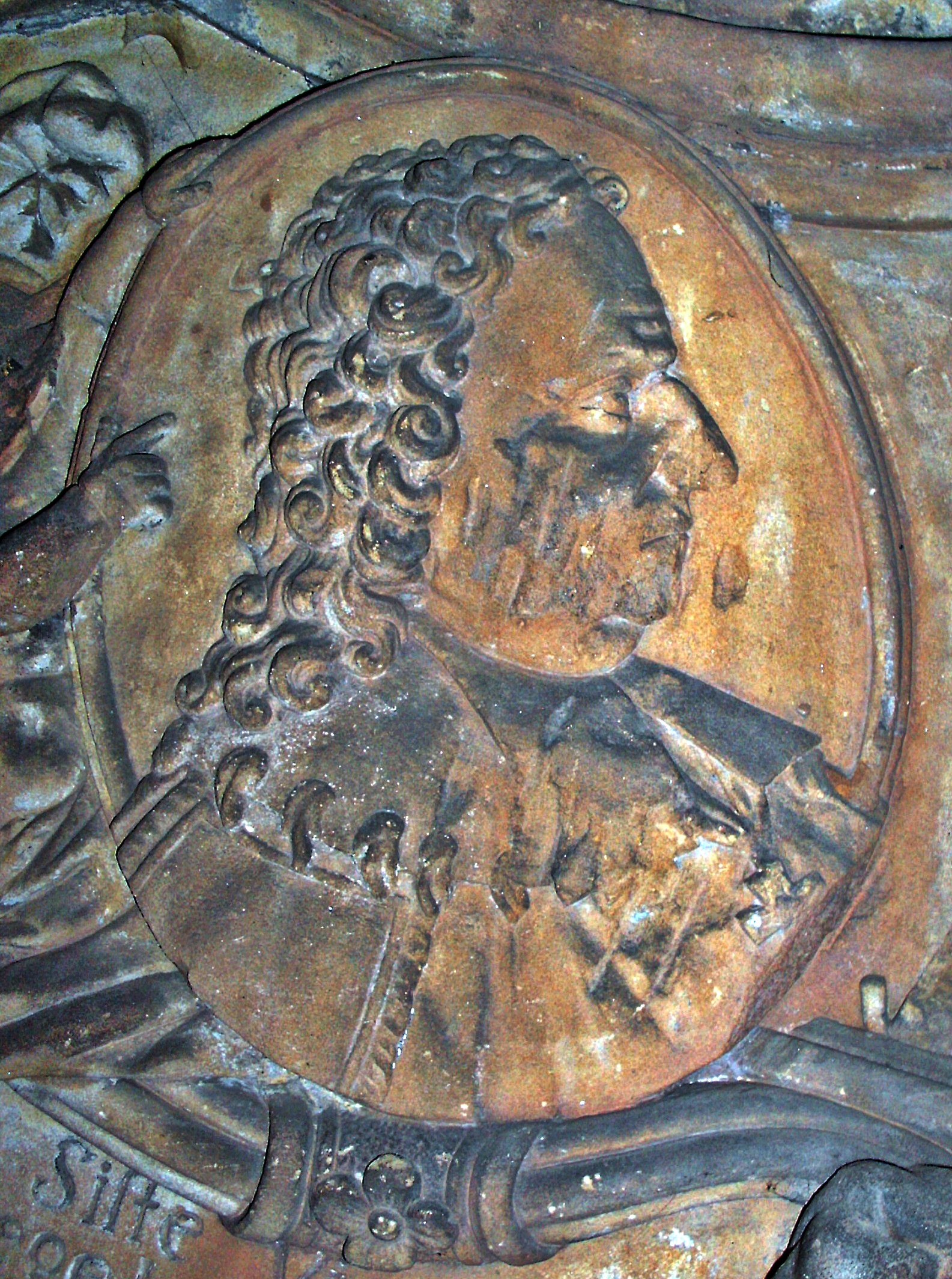 Speyer, Dom, Portrait des Domherrn Karl Wolfgang Heinrich von Rollingen (+1730), von seinem Epitaph